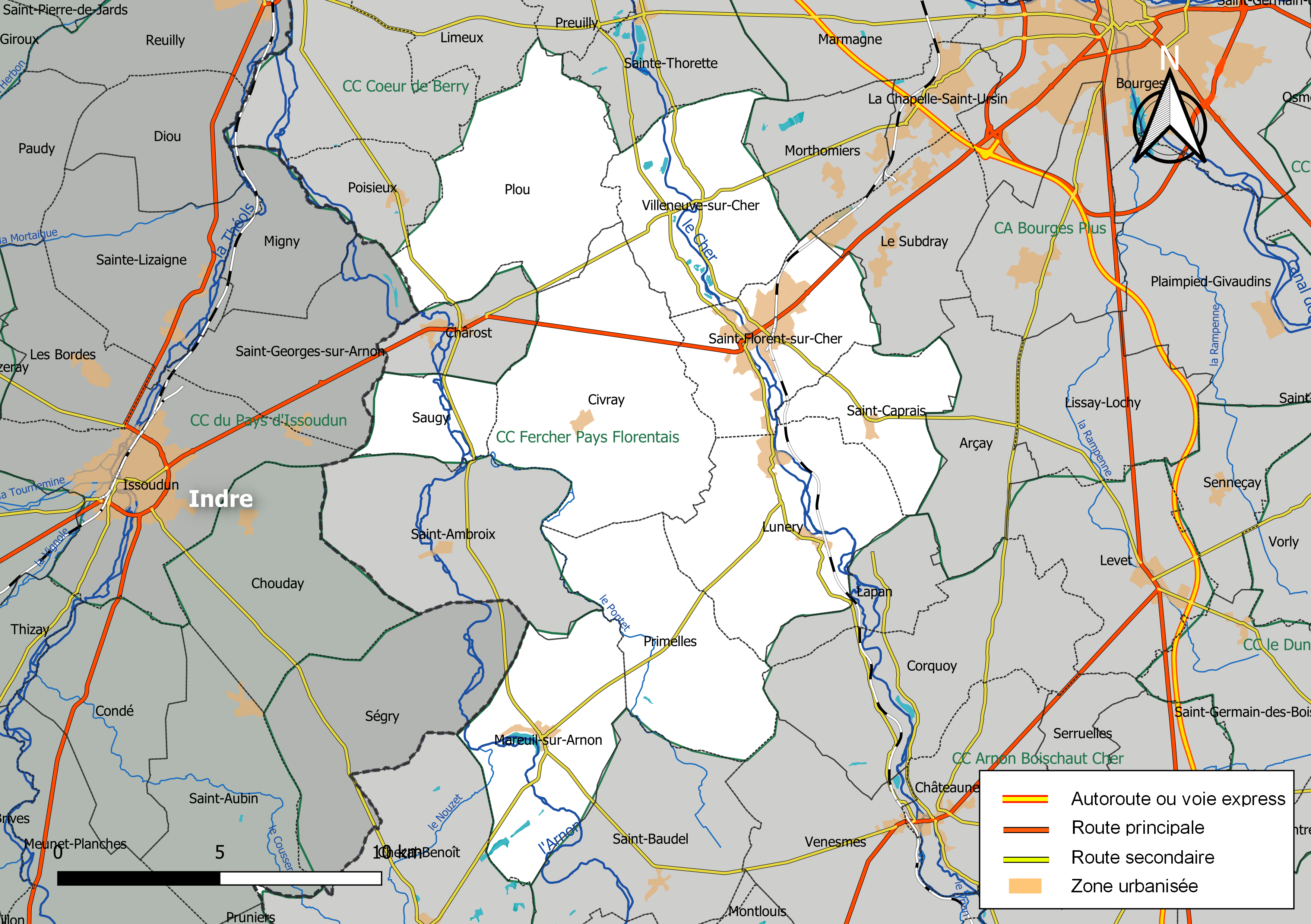 Carte géographique de la communauté de communes FerCher - Pays Florentais, département du Cher, France. Composition au 1er janvier 2019.